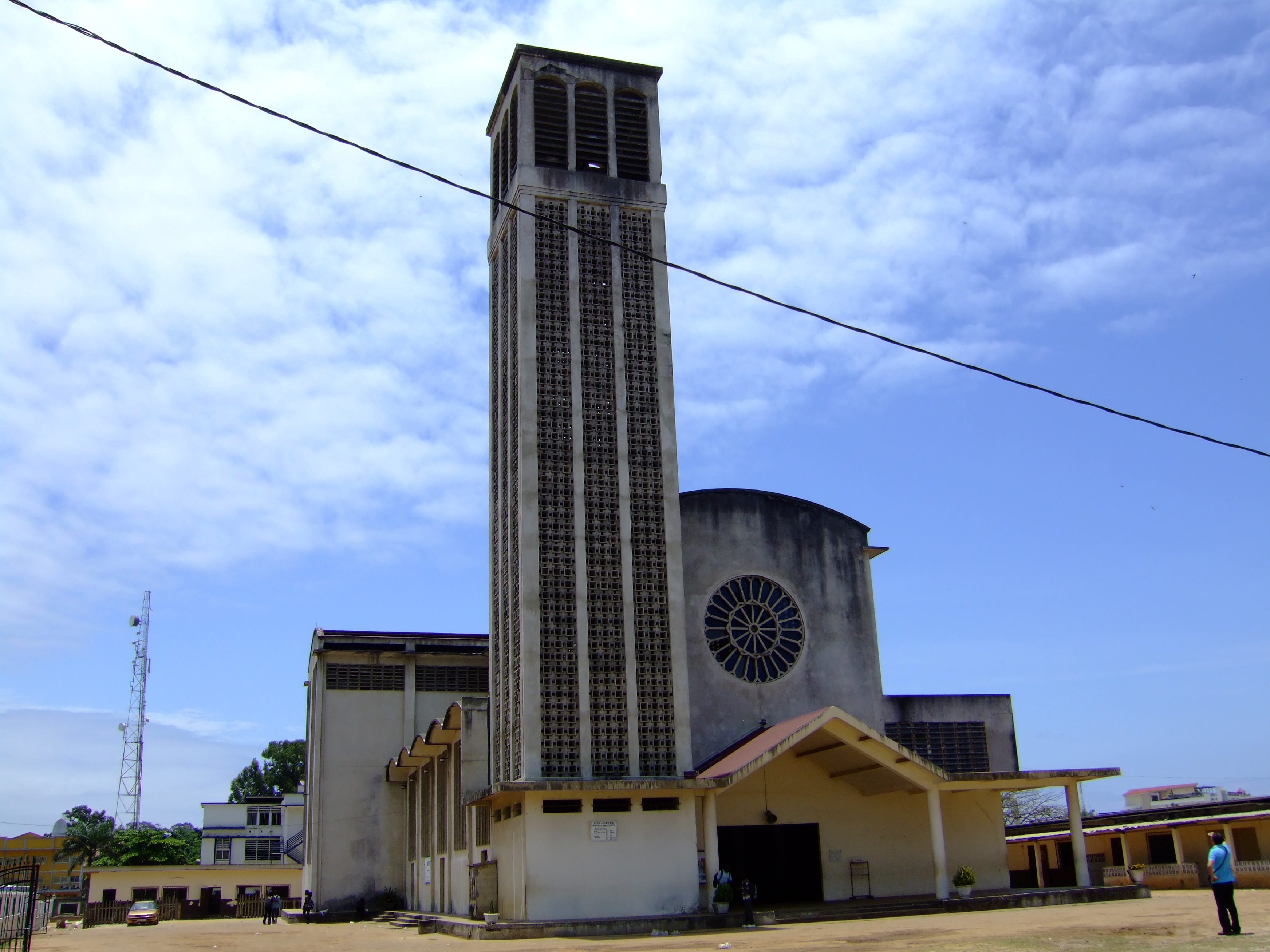 Cattedrale di Notre Dame — Pointe Noire, Repubblica del Congo.